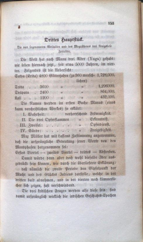 Schaden an einer Buchseite durch ein säurehaltiges Einlegepapier